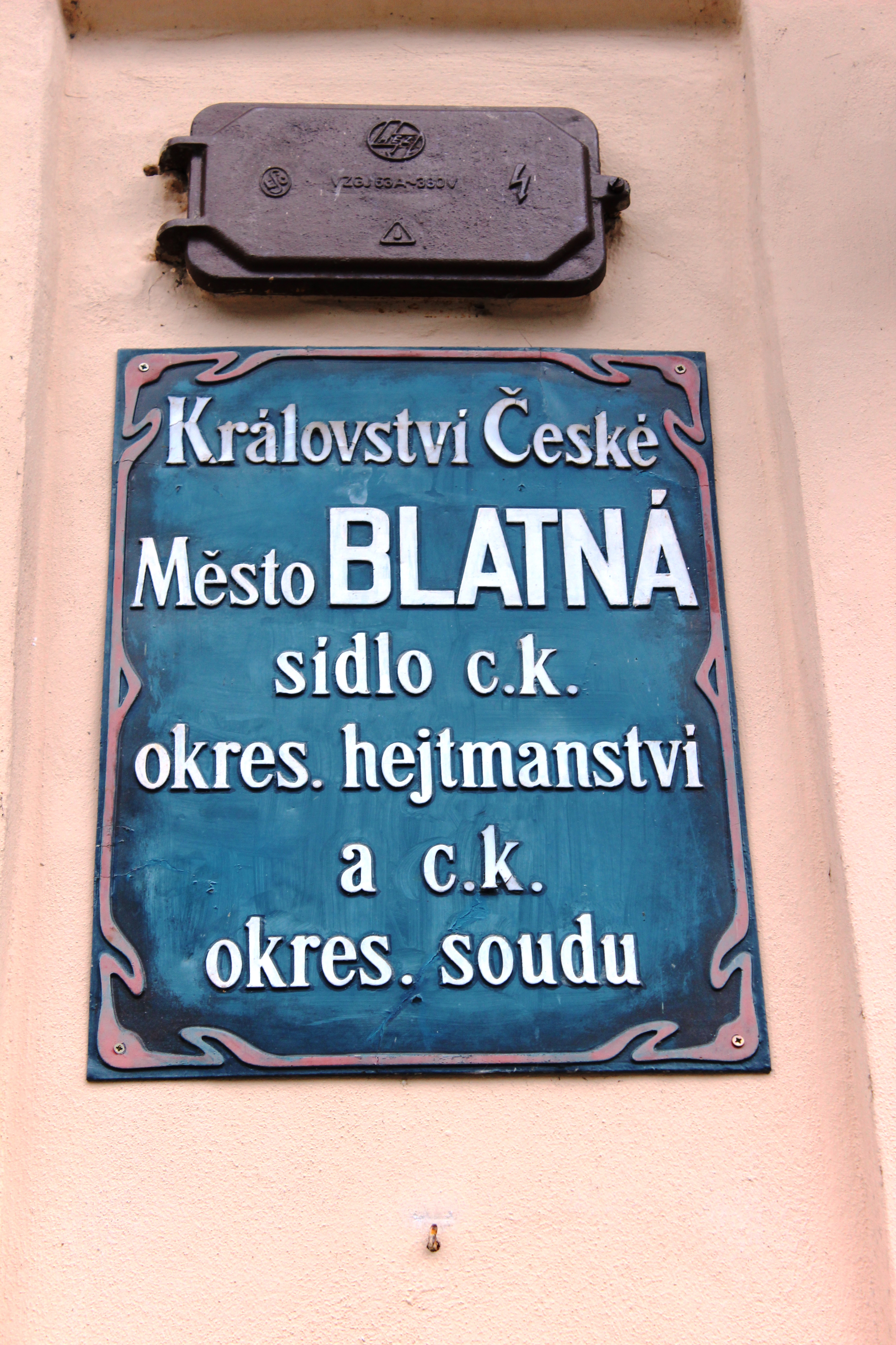 Na Příkopech. Infotabule na domě. Blatná v okrese Strakonice v Jihočeském kraji. Česká republika.